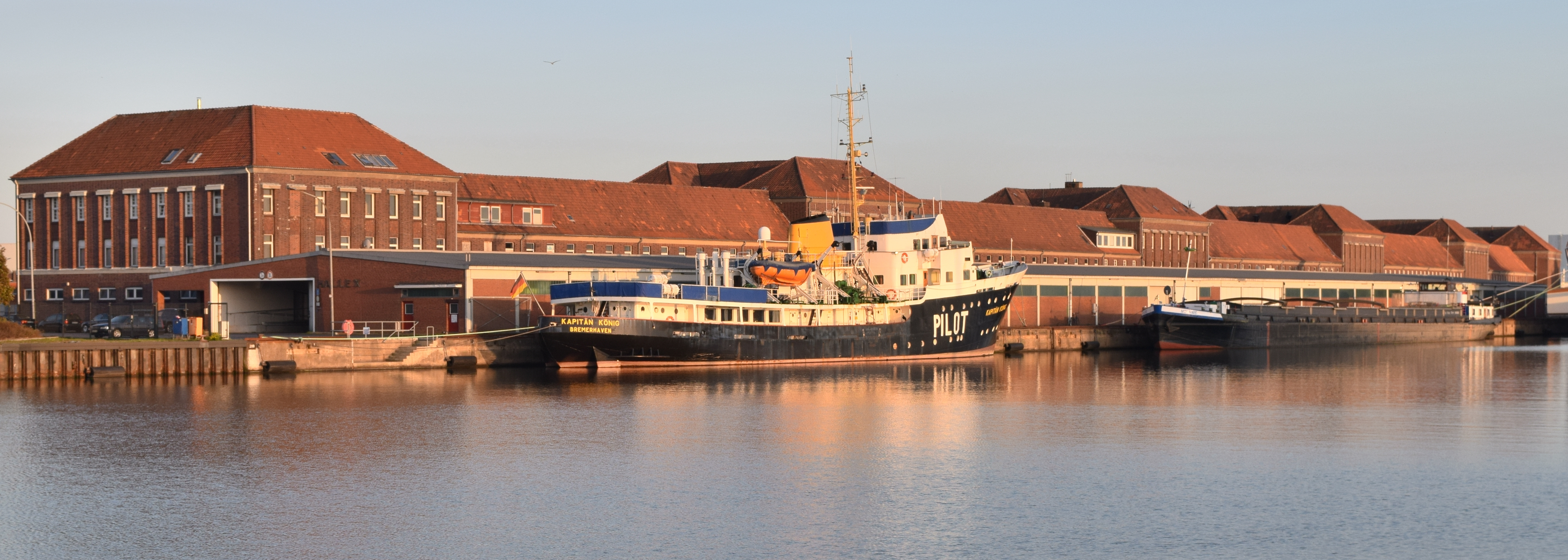 Packhalle X in Bremerhaven, Fischauktionsstraße 1Das abgebildete Objekt ist ein geschütztes Kulturdenkmal in der Freien Hansestadt Bremen, mit der Nr. 3017 beim Landesamt für Denkmalpflege registriert.